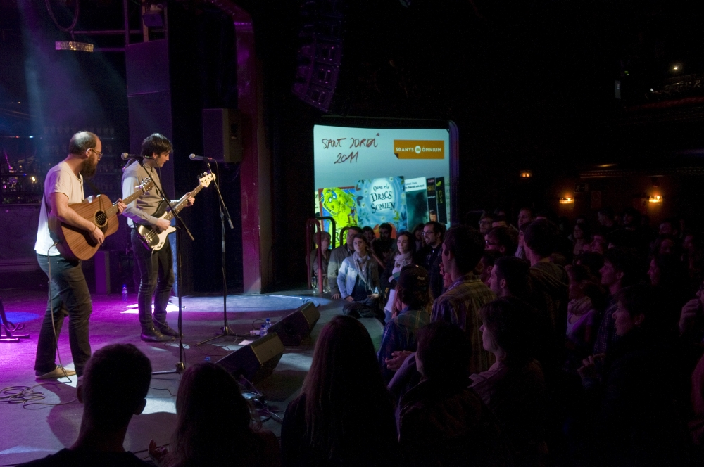 El grup 4t 1a (Quart Primera) va posar punt i final a la festa de Sant Jordi.